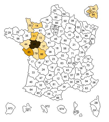 Carte de France de la répartition du patronyme BLOUIN